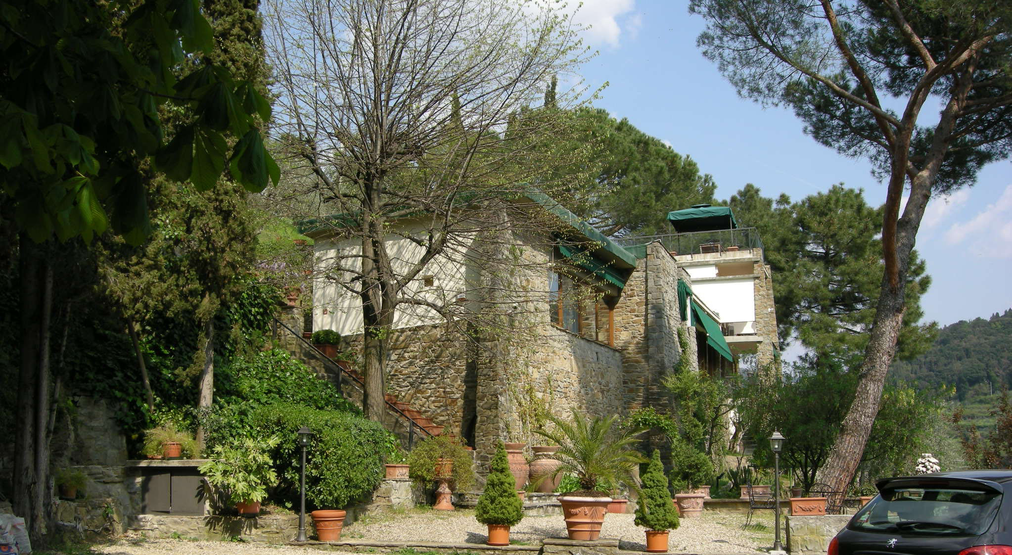 Complesso di monterinaldi